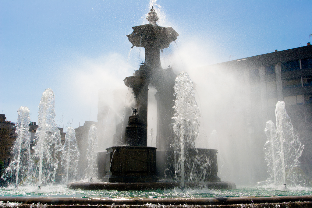 Fuente de Las Batallas, situada en una amplia explanada llamada Puerta Real, en pleno centro de la ciudad de Granada (Andalucía; España). Antiguamente estuvo instalada en el Paseo del Salón de la citada ciudad. Los aficionados al fútbol celebran en esta fuente las victorias del equipo Granada CF.